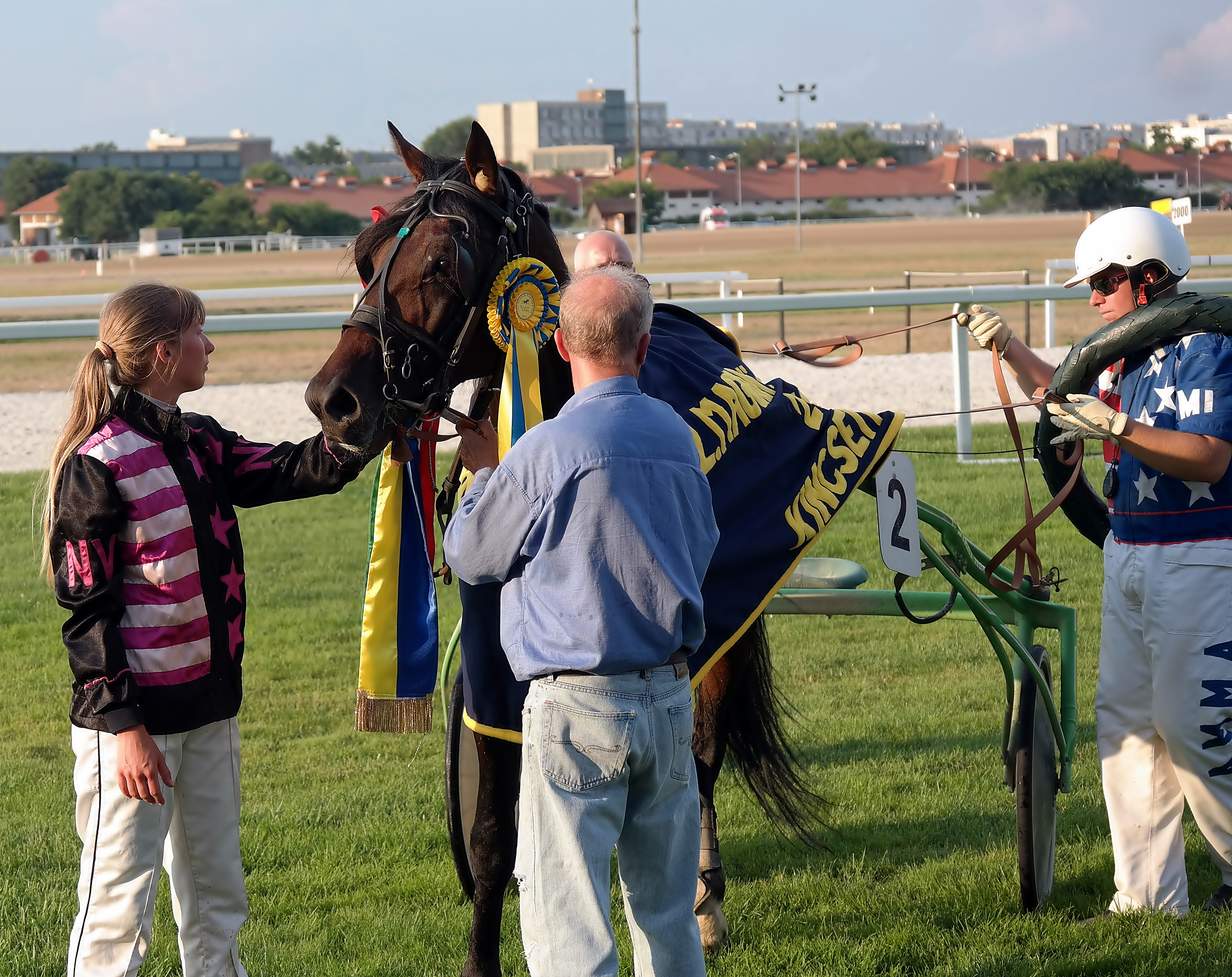 Time To Say Goodbye a 2016-os Magyar Ügetőderby győztese (Kincsem Park, Budapest)